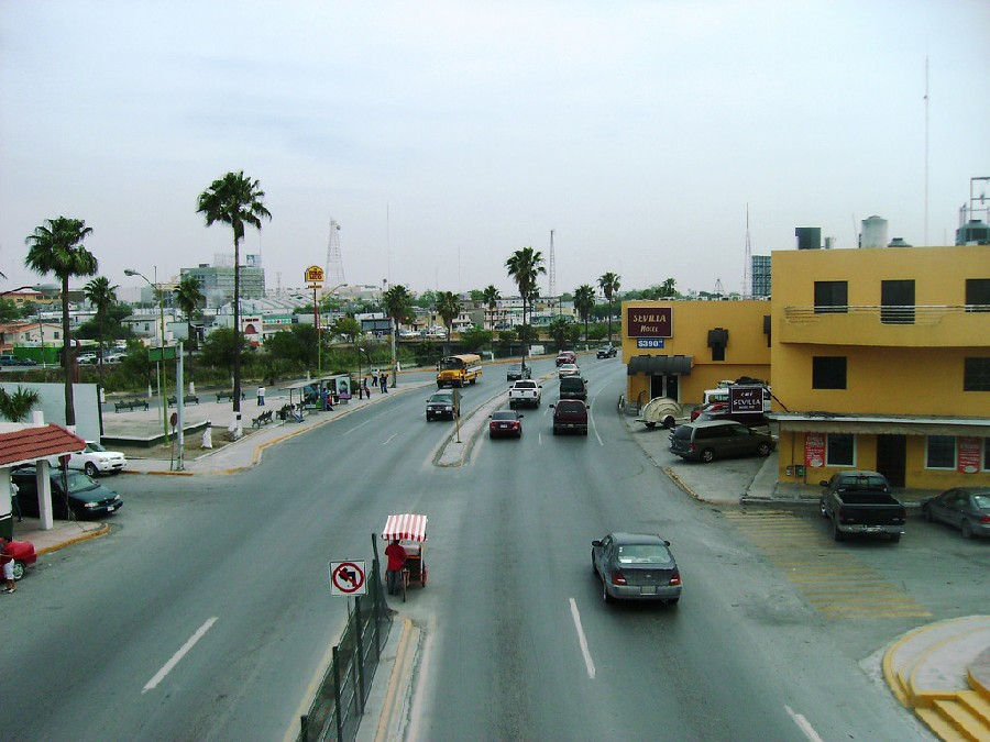 Bulevard Hidalgo de la Ciudad de Reynosa, Tamaulipas